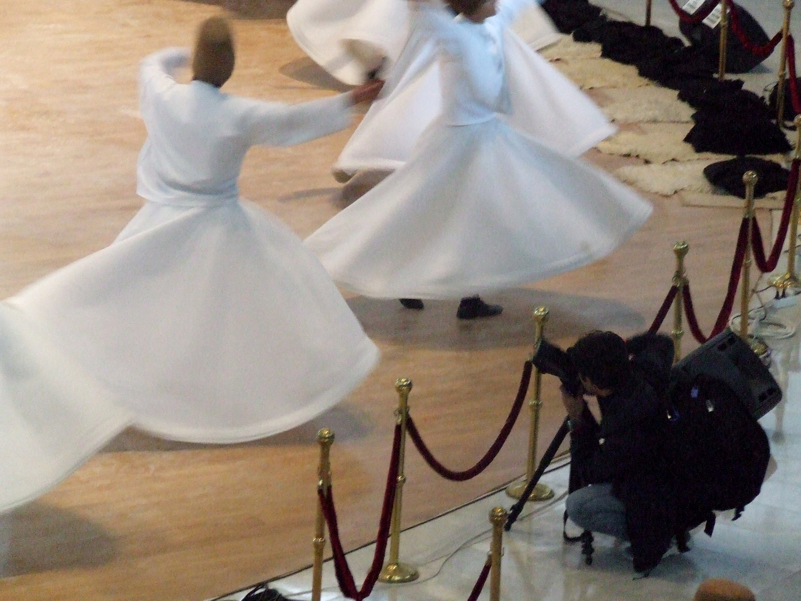 کاسپین ماکان در حال تصویر برداری از سماع عاشقان